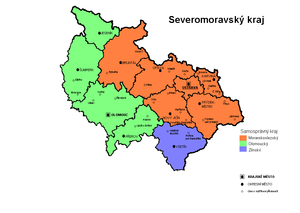 Mapa Severomoravského kraje (1960-90), mapový podklad: mapy NUTS z české wikipedie, úprava v graf. editoru